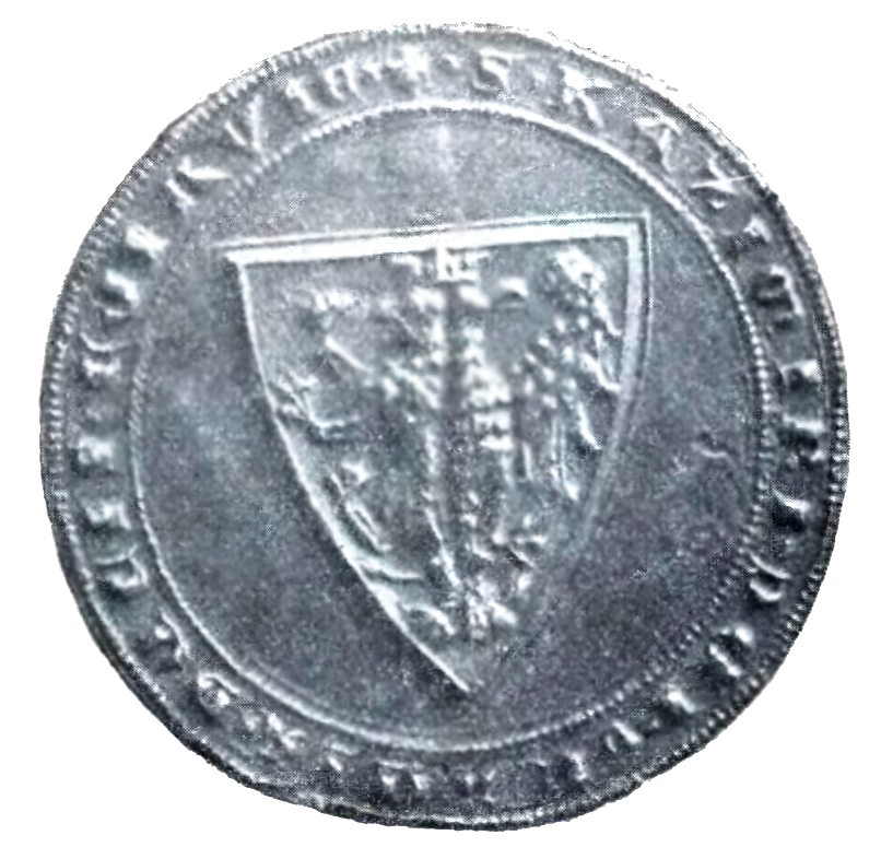 Kazimierz III Gniewkowski seal